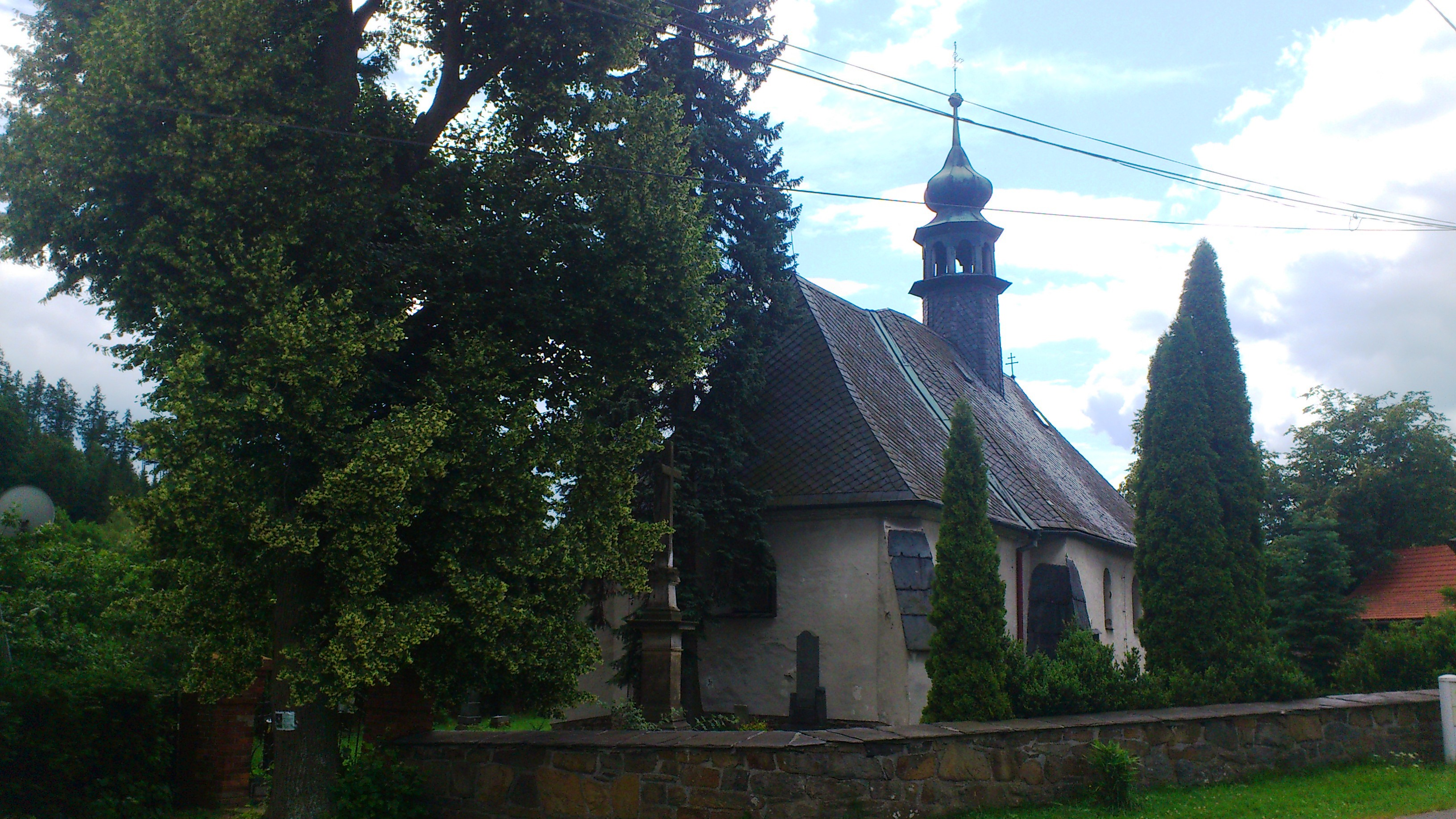 Obec Kružberk.